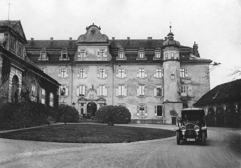 Die Beisetzung der Großherzogin Luise von Baden fand im Beisein des schwedischen Königspaares in Karlsruhe am 30.4.23 statt. Schloss Baden in Baden-Baden. Der letzte Wohnsitz der Grossherzogin.